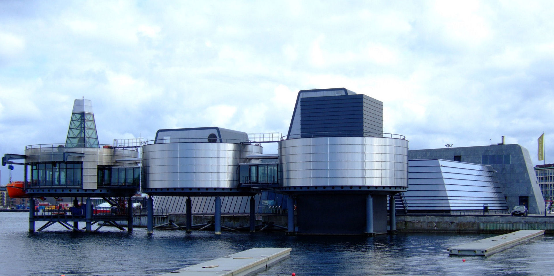 Norsk Oljemuseum